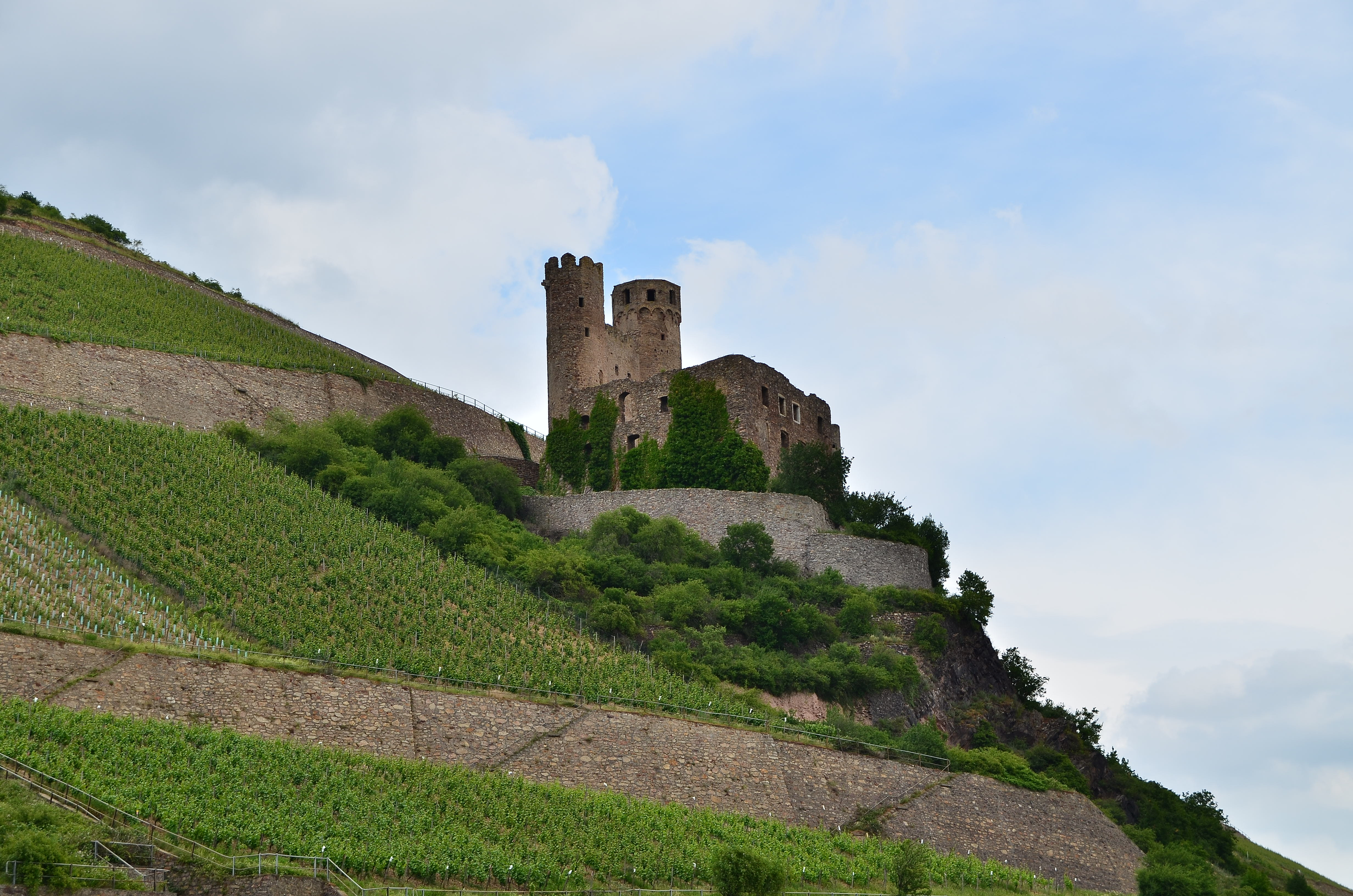 Burg Ehrenfels am Rhein. Sicht von Nordwesten